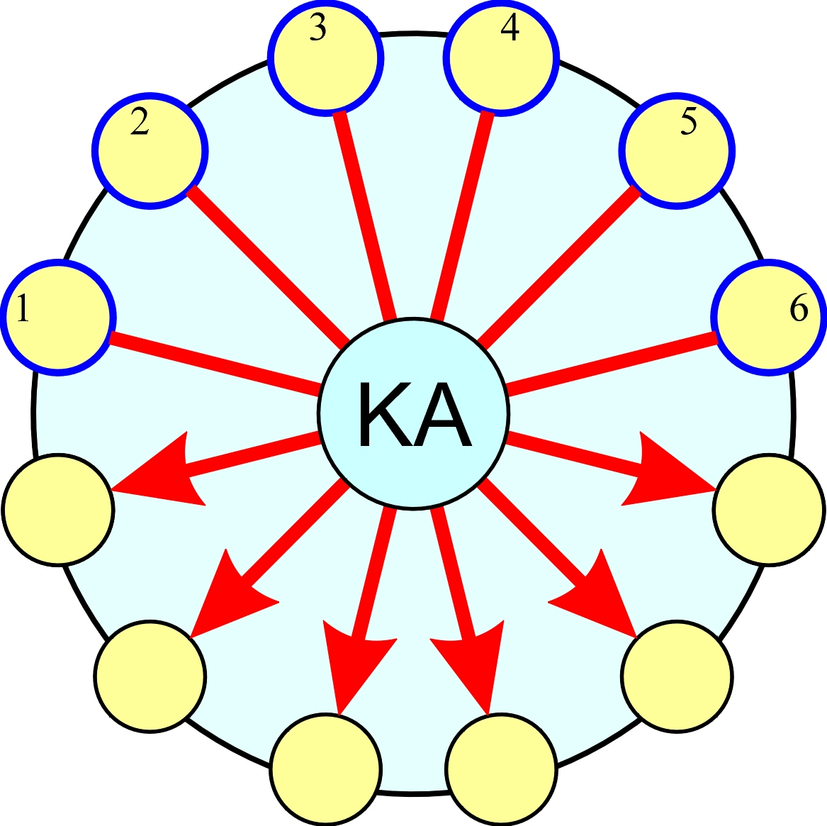 slogovna okolopružaljka s rješenjem Kameni svatovi